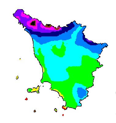 Carta delle precipitazioni medie annue in Toscana (1961-1990) 2.050 mm